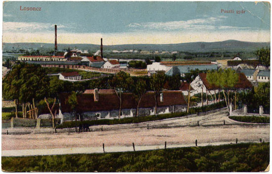 Pohľadnica textilky v Opatovej (Lučenec) založenej v roku 1868 zo začiatku 20. storočia.